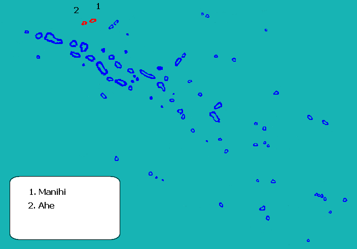 Mapa de localització de la comuna de Manihi a l'arxipèlag Tuamotu, Polinèsia Francesa.